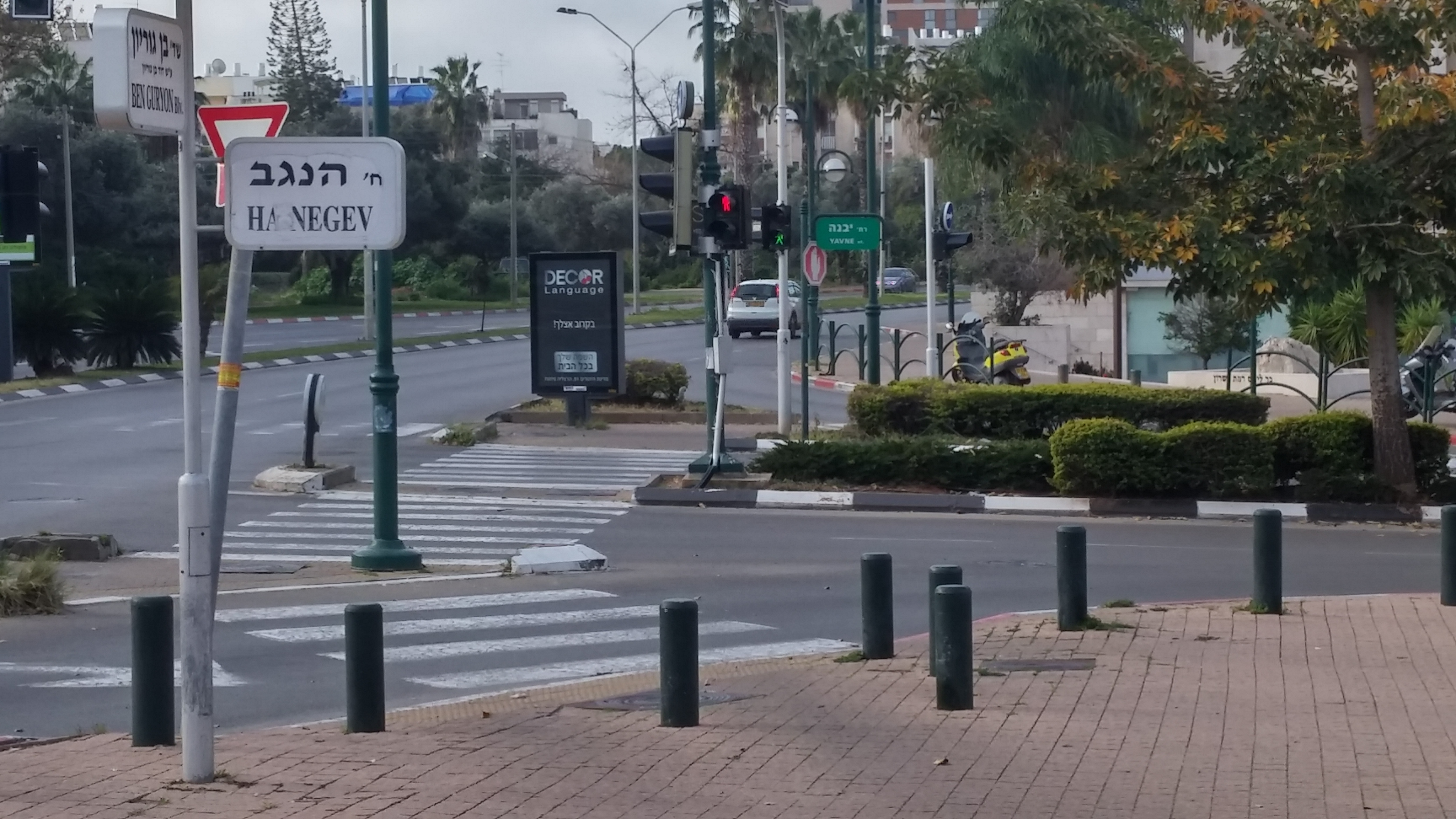 רחוב יבנה ברמת השרון הוא רחוב הנגב בהרצליה